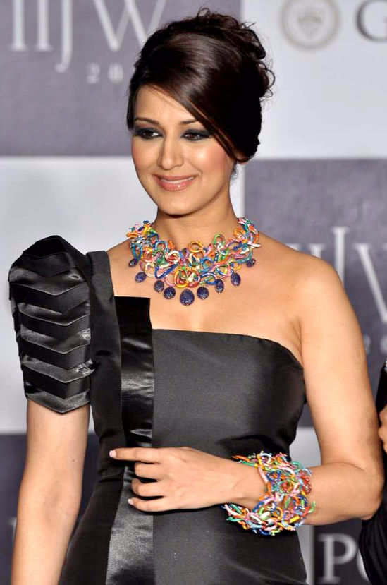 Sonali Bendre at IIJW ramp walk